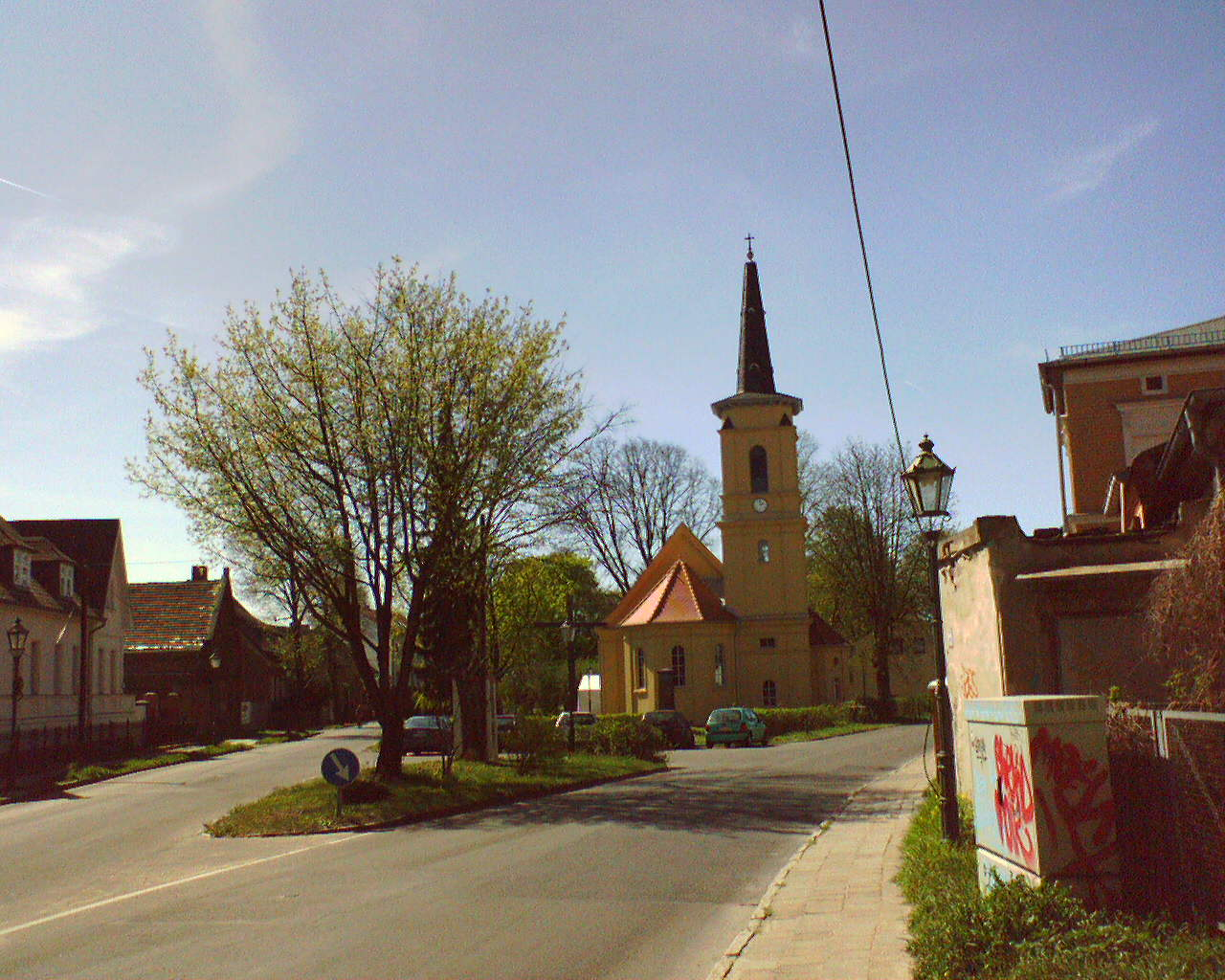 Dorfkirche Bohnsdorf, Blickfeld auf Dorfanger